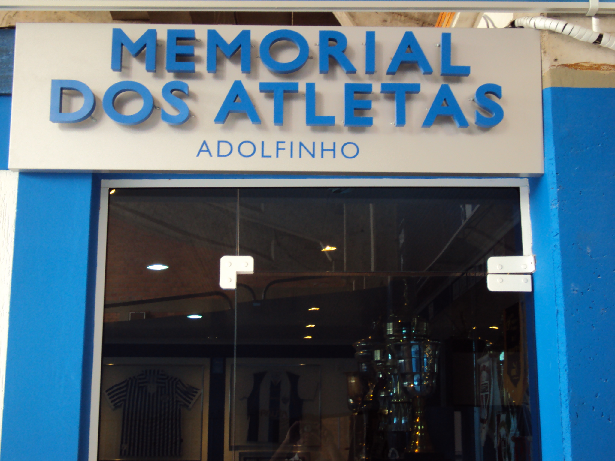 Memorial de atletas Adolfo Martins Camilli, do Avaí Futebol Clube.